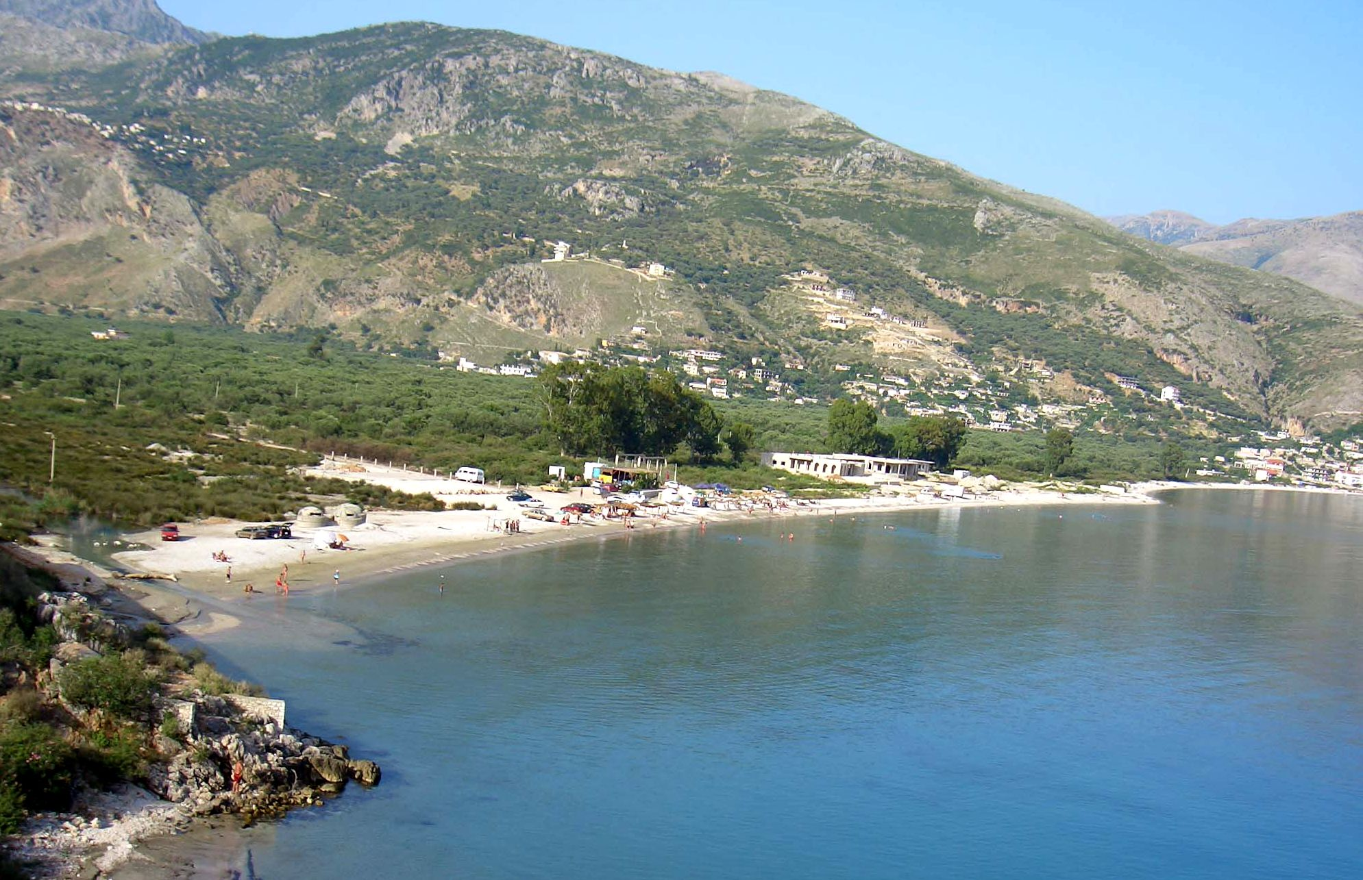 Strand bei Qeparo an der albanischen Rivera